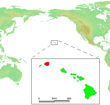 Hawaii Islands - Kauai.PNG